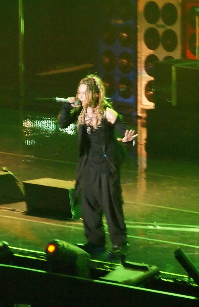 L'arc En Ciel @ MSG - 3/25/12 - 055